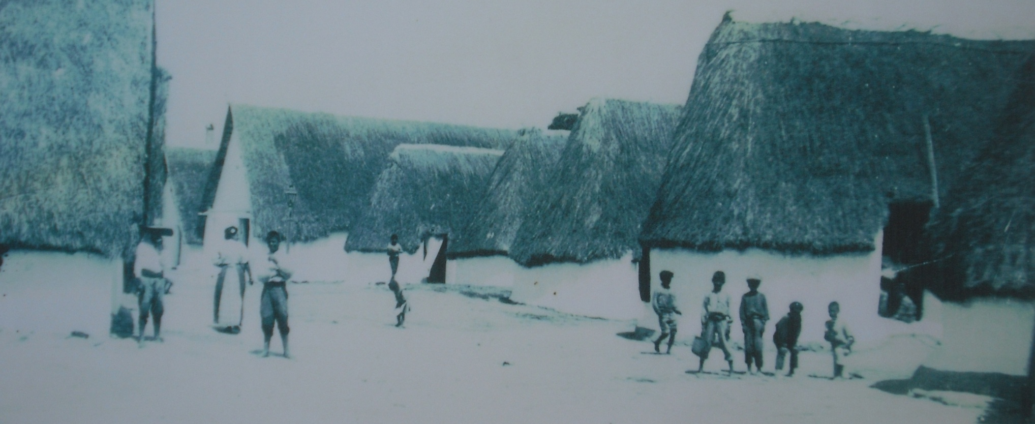 El Palmar a principis del segle XX.